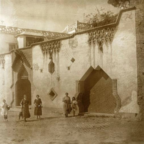 Finca Sansalvador, años 1910 o 1920.